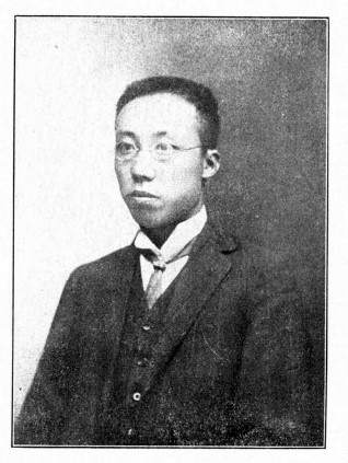 中華民國國會議員